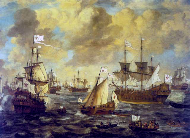 The Brandenburg Navy on the Open Sea; (vorn links die Friedrich Wilhelm zu Pferde, im Bildhintergrund links außen die Berlin, in der Bildmitte vorn die Jacht des Kurfürsten, zwischen der Friedrich Wilhelm zu Pferde und der kurfürstlichen Jacht das Heck der Dorothea und die Rother Löwe, rechts im Vordergrund die Markgraf von Brandenburg, und ganz rechts die Kurprinz)